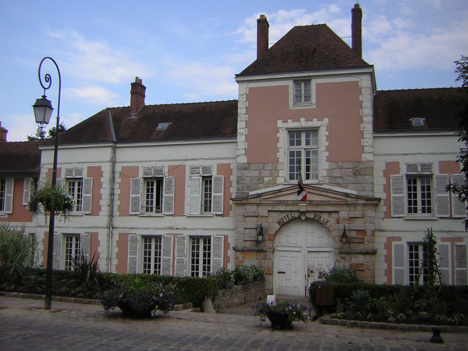 Lardy (91) Mairie